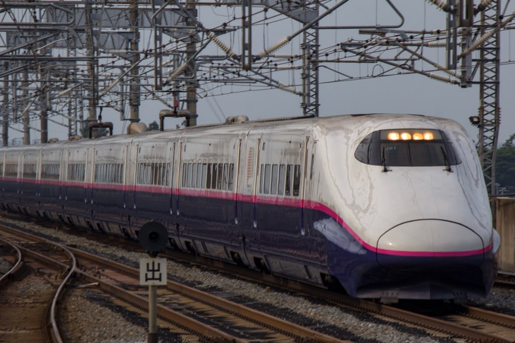 E2系1000番台J61編成 2019年8月4日古川駅にて撮影